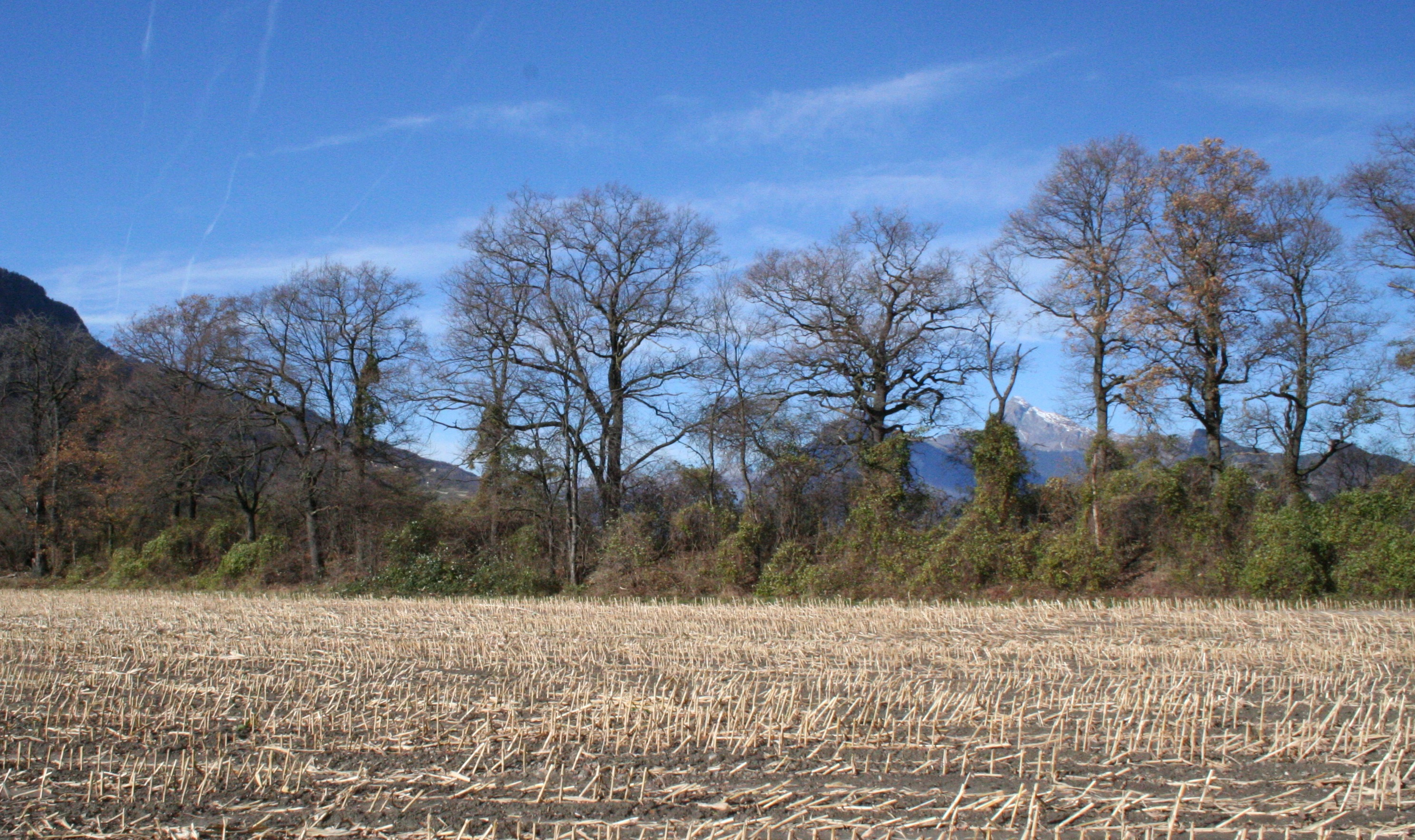 Rohanschanze bei Landquart Nordseite innen